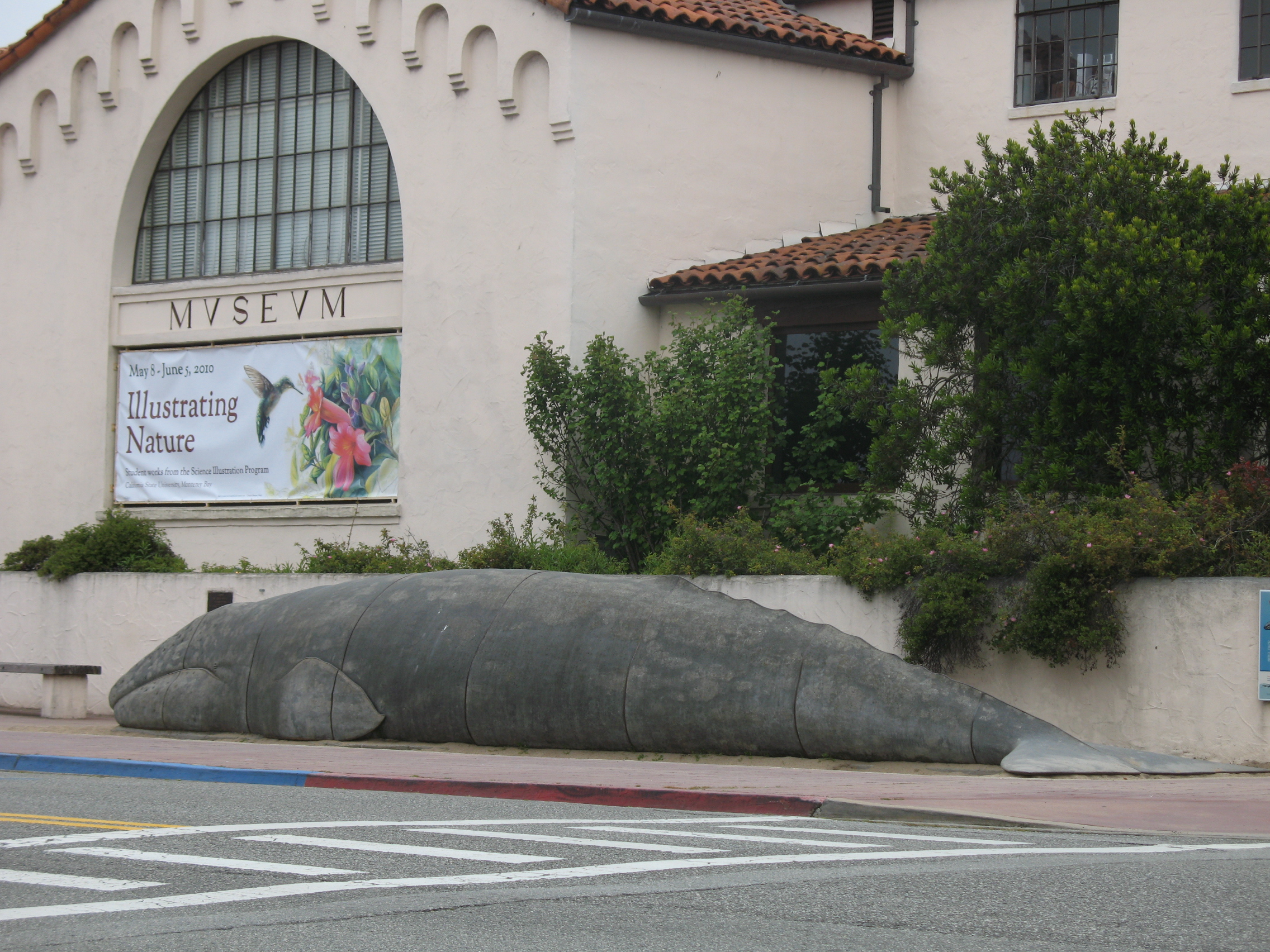 Steinerner Wal vor dem Pacific Grove Museum for Natural History in Carmel-by-the-Sea (Kalifornien).